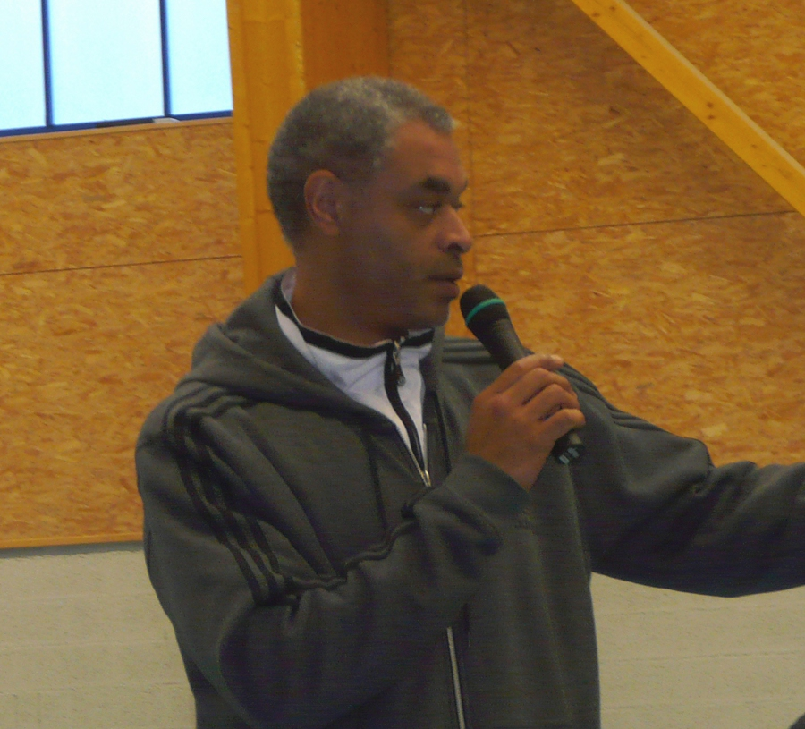 Hugues Occansey, entraîneur du ADA Blois Basket 41